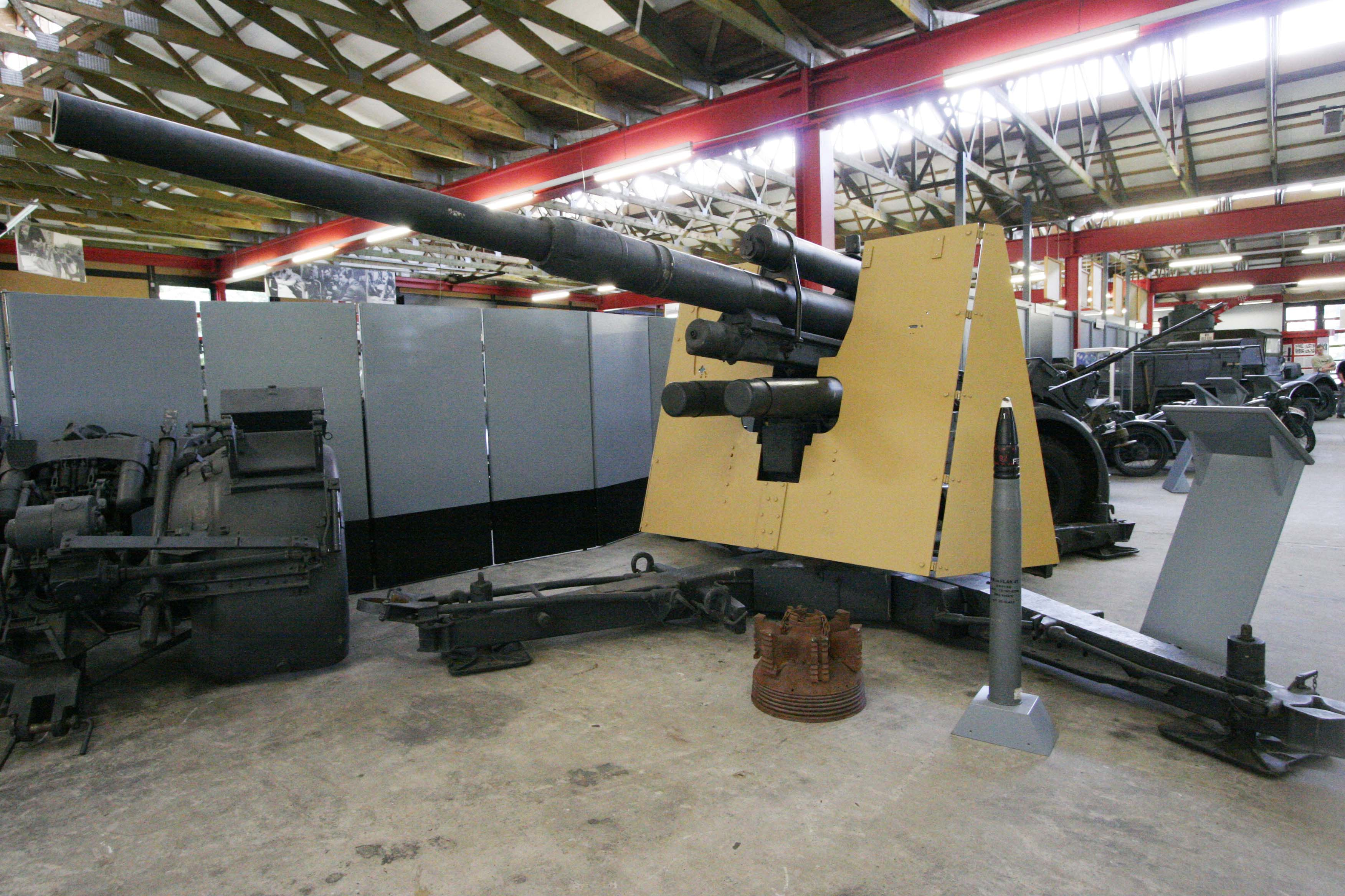 8,8 cm Flugabwehrkanone (FlaK) 37 L/56 on display at the Deutsches Panzermuseum Munster , Germany.